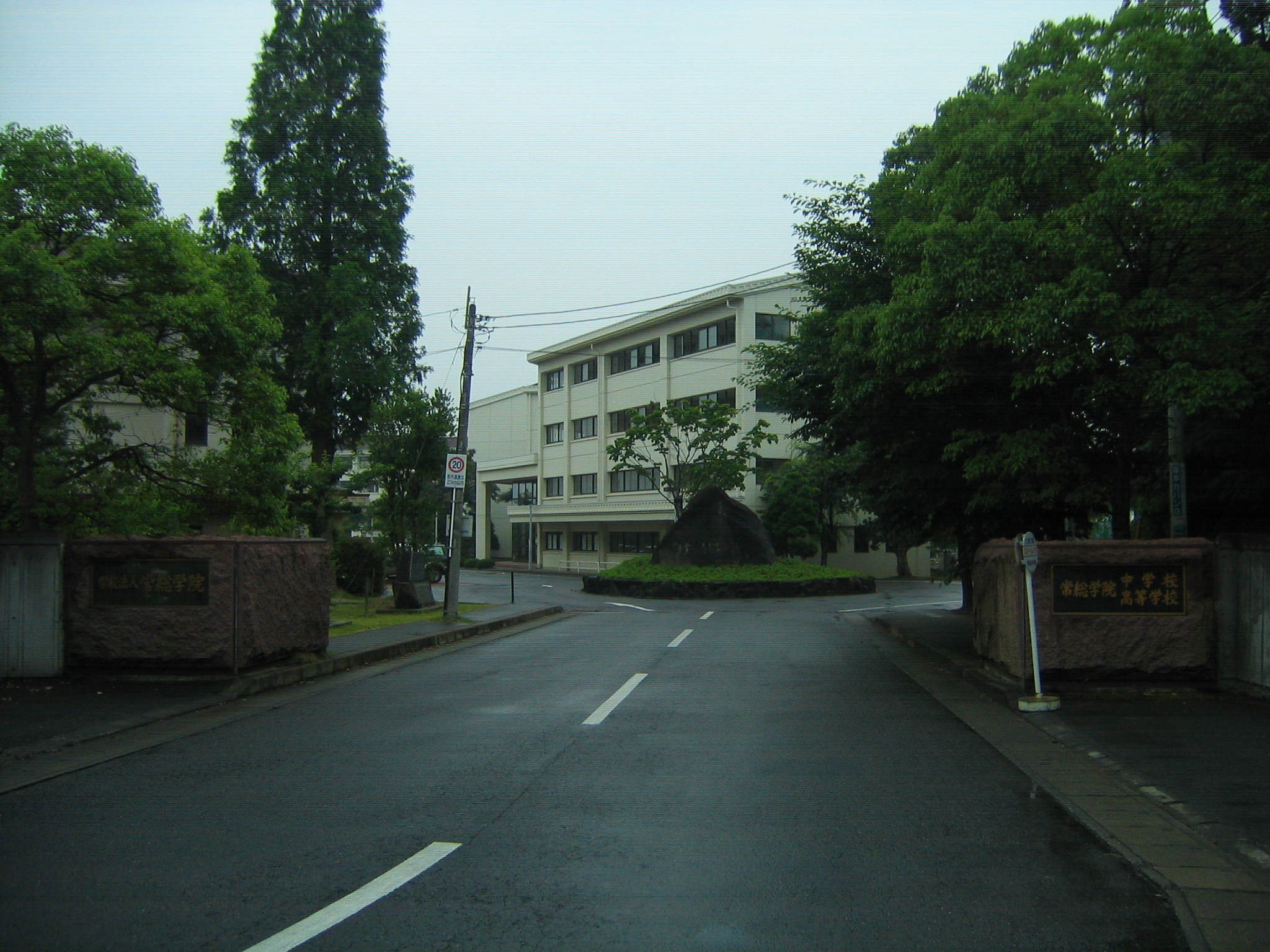 常総学院正門